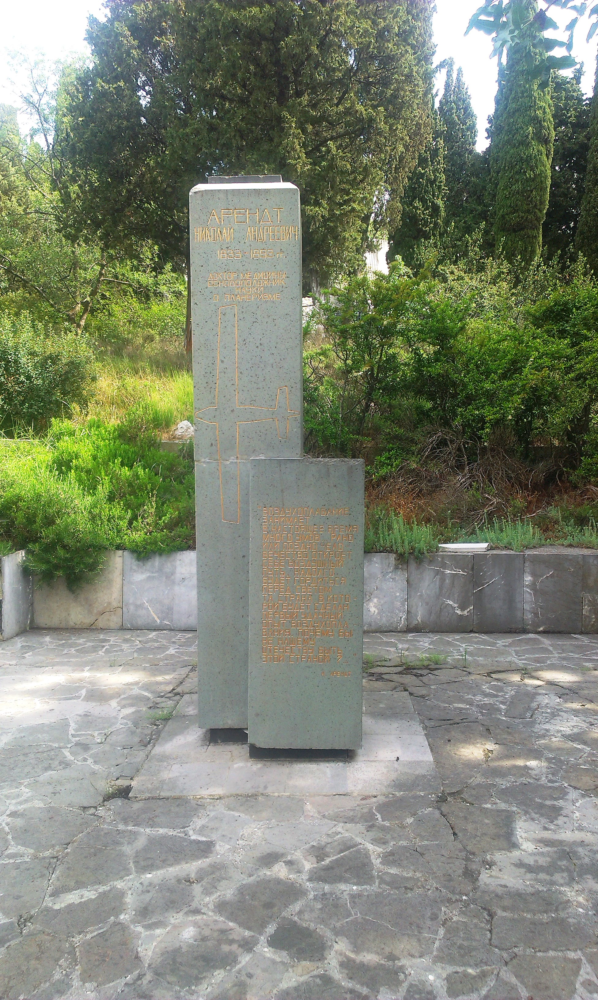 Поликуровский мемориал